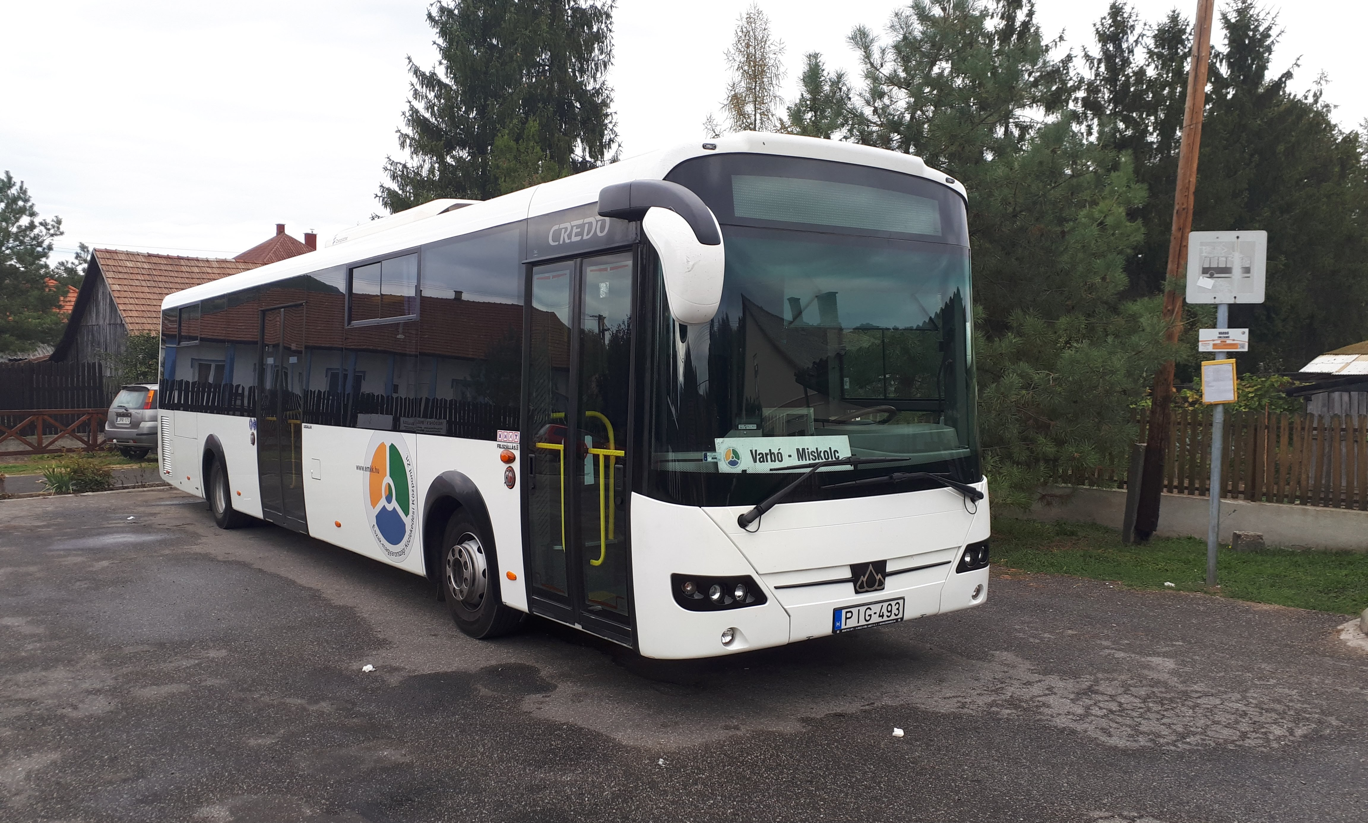 Az ÉMKK PIG-493 rendszámú Credo Econell 12 típusú busza Varbón, a 3754-es helyközi járaton.